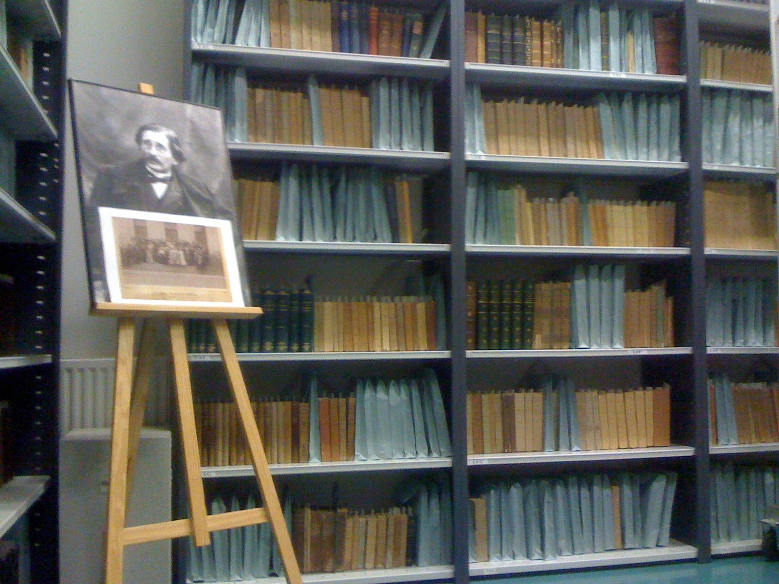 Fonds Gabriel Tarde à l'ENAP